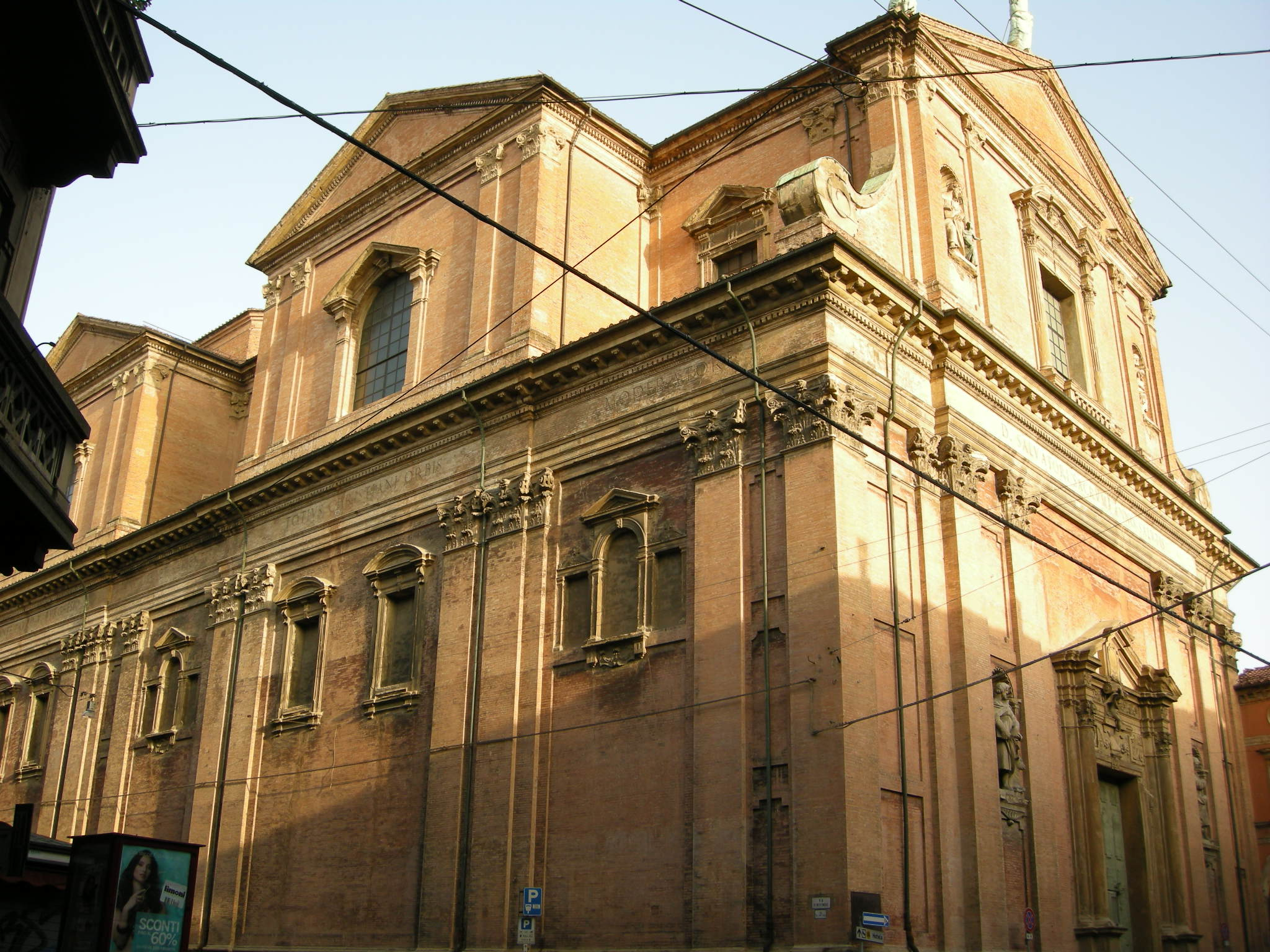 Bologna, san salvatore